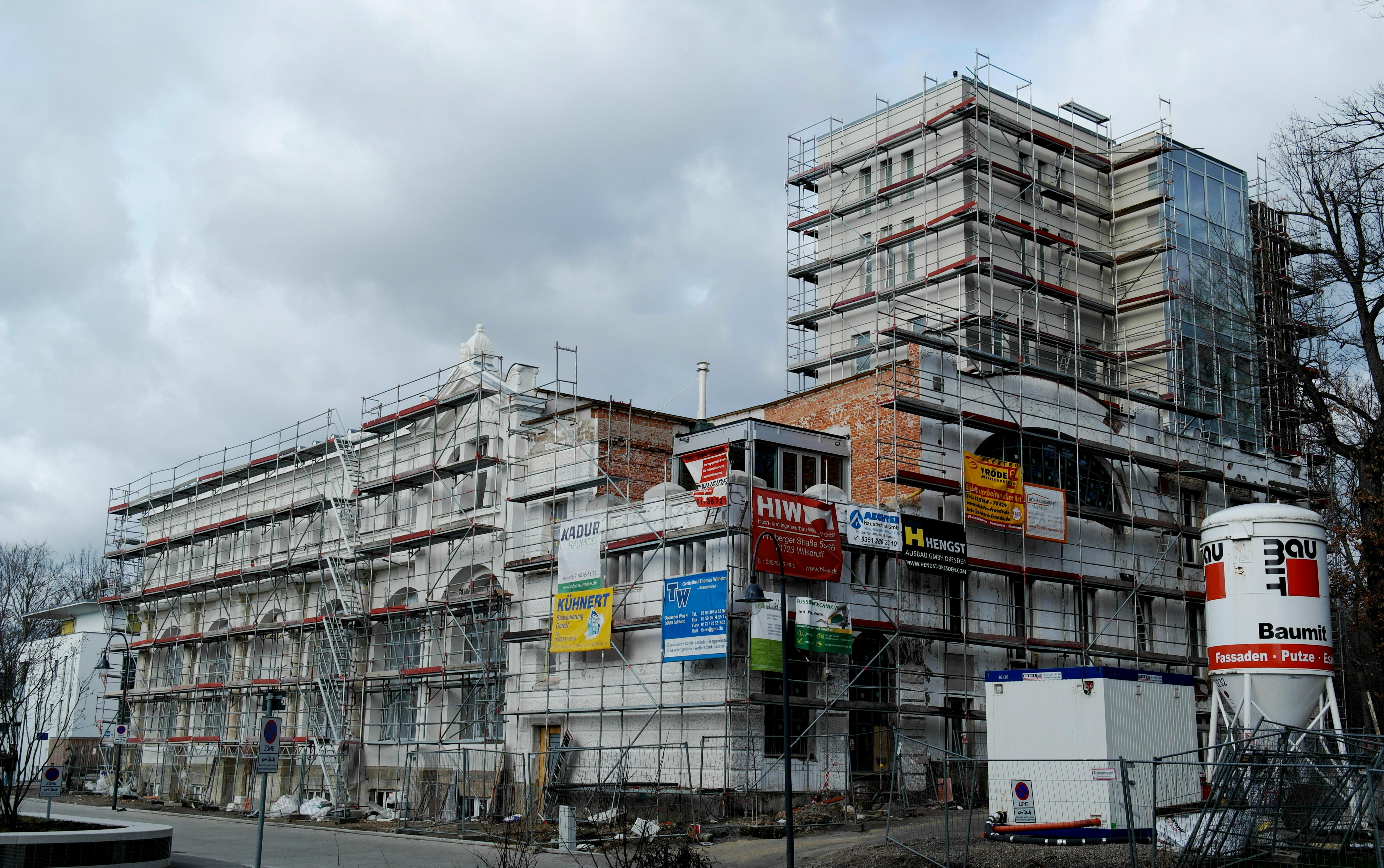 Dresden-Weißer Hirsch: Lahmann-Sanatorium; Dr.Lahmann-Park